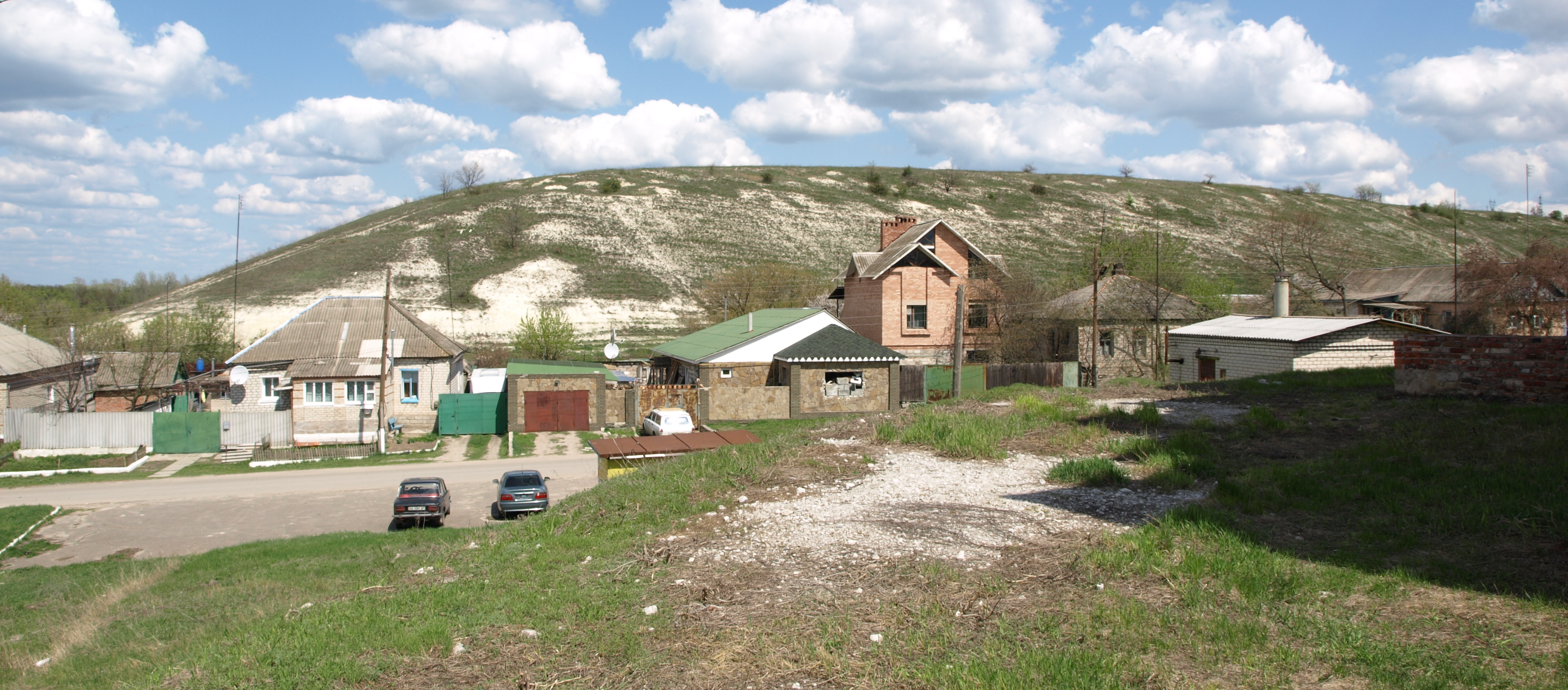 Весёлая гора